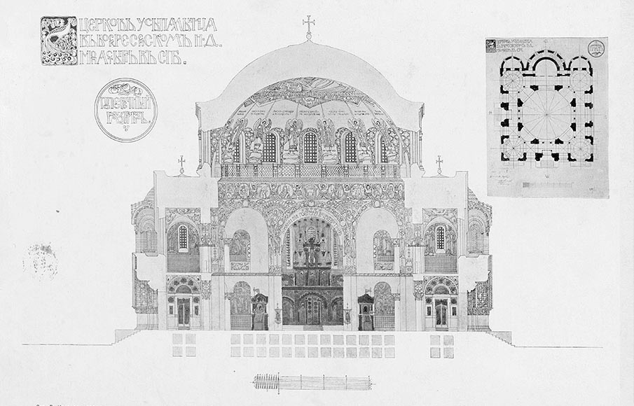 Проект Казанской церкви в Новодевичьем монастыре